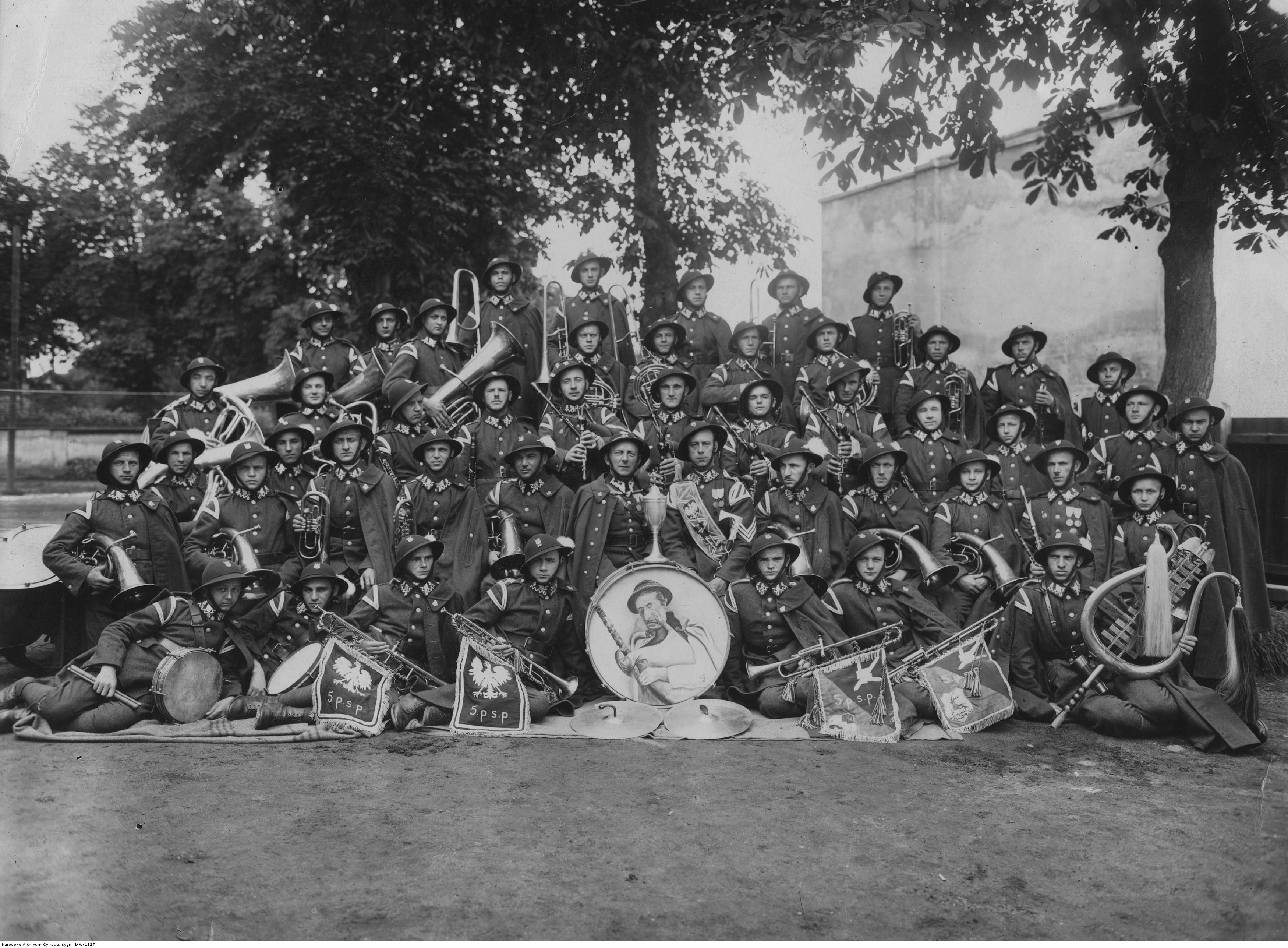 Orkiestra 5 Pułku Strzelców Podhalańskich w Przemyślu. Fotografia grupowa orkiestry z pucharem za zajęcie I miejsca w konkursie muzycznym DOK X Przemyśl. Widoczny m.in. kapelmistrz por. Adam Osada (przepasany wstęgą). Koncern Ilustrowany Kurier Codzienny - Archiwum Ilustracji. Sygnatura: 1-W-1327